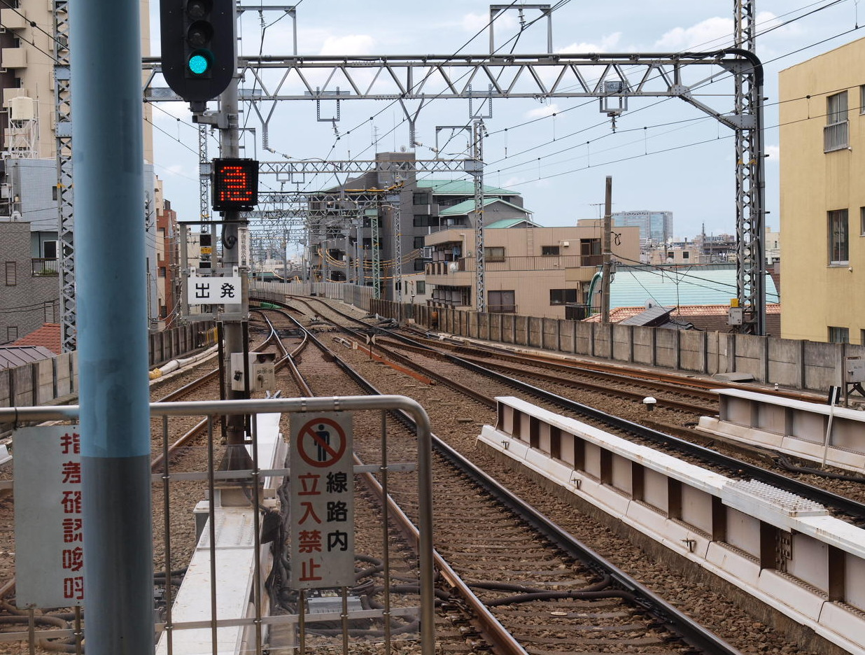 平和島駅プラットホームより浦賀方を望む。上り線が高架化されている。